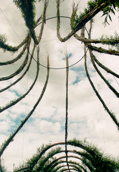 Weidenkirche auf dem Gelände der Landesgartenschau Kaiserslautern Für Wikipedia aufgearbeitet --Immanuel Giel 11:19, 12. Mai 2005 (CEST)